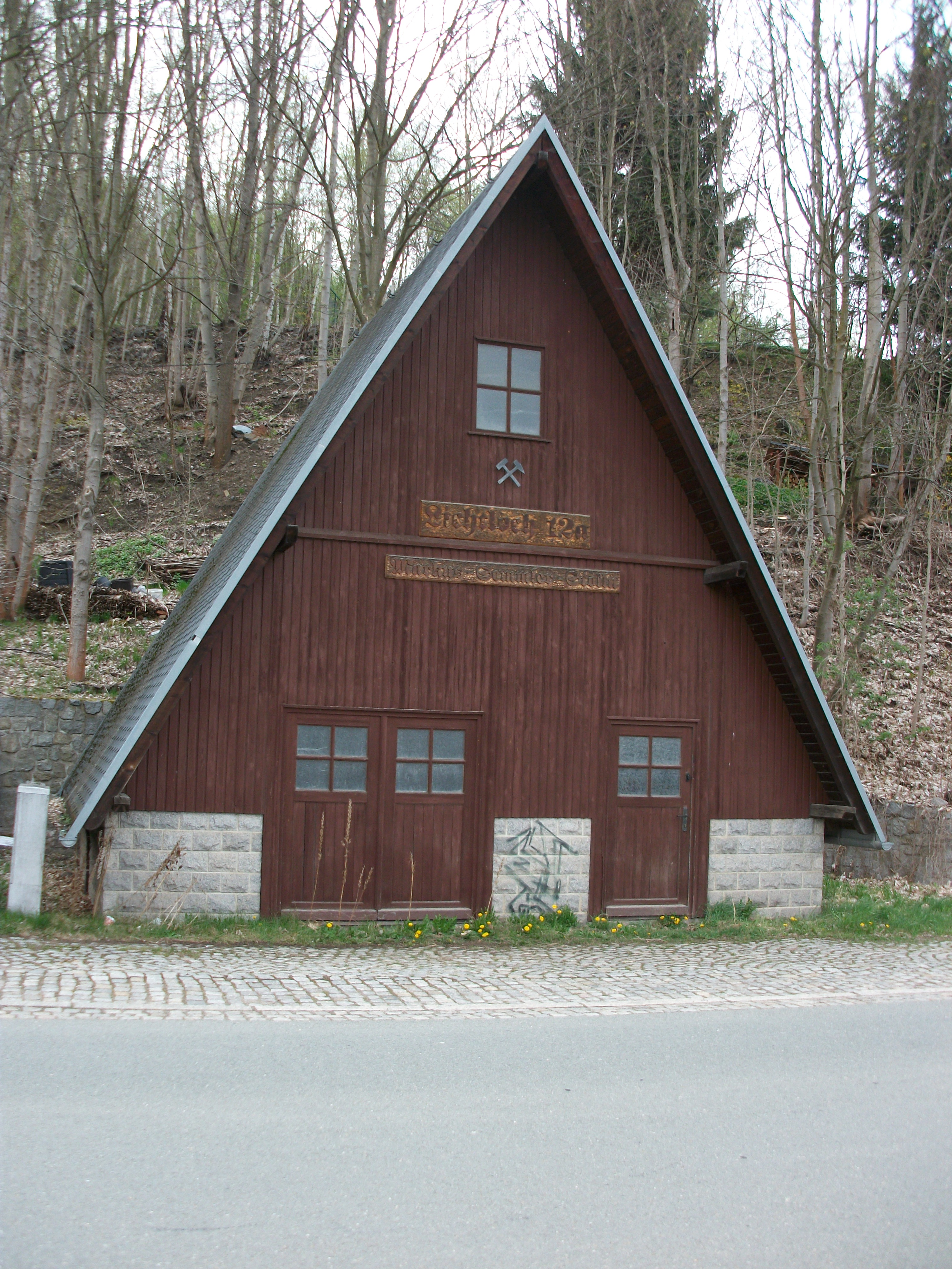 Markus-Semmler-Stollen, Lichtloch 12a in Niederschlema